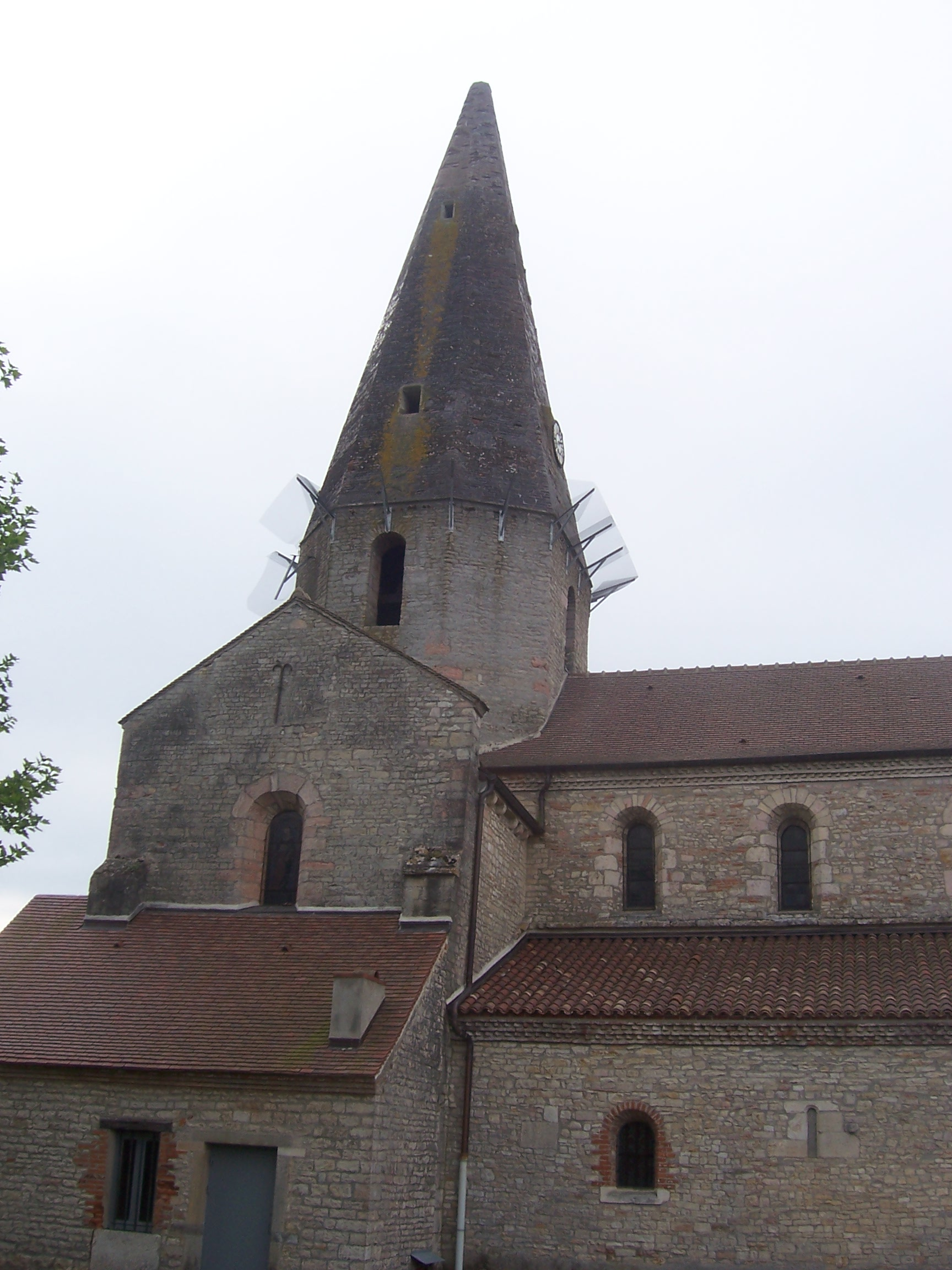 Eglise de Saint-Christophe-en-Bresse